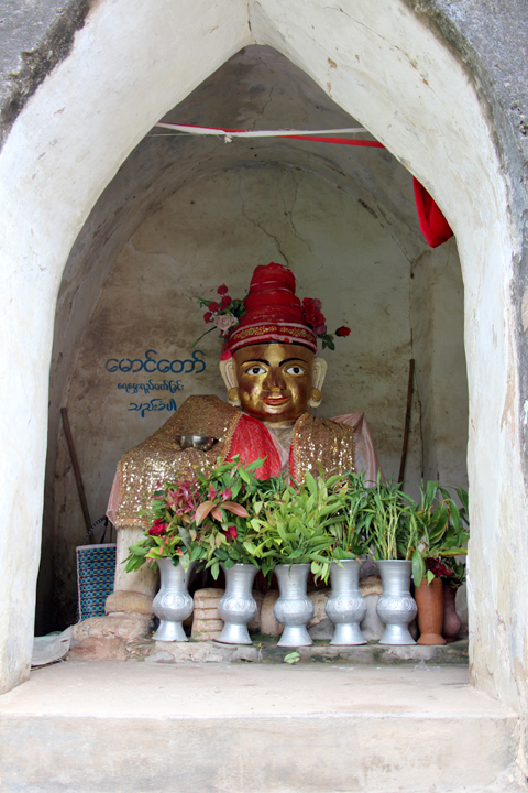 မြန်မာဘာသာ: သရပါတံခါးဘေးရှိ မောင်တော် နတ်ကွန်း